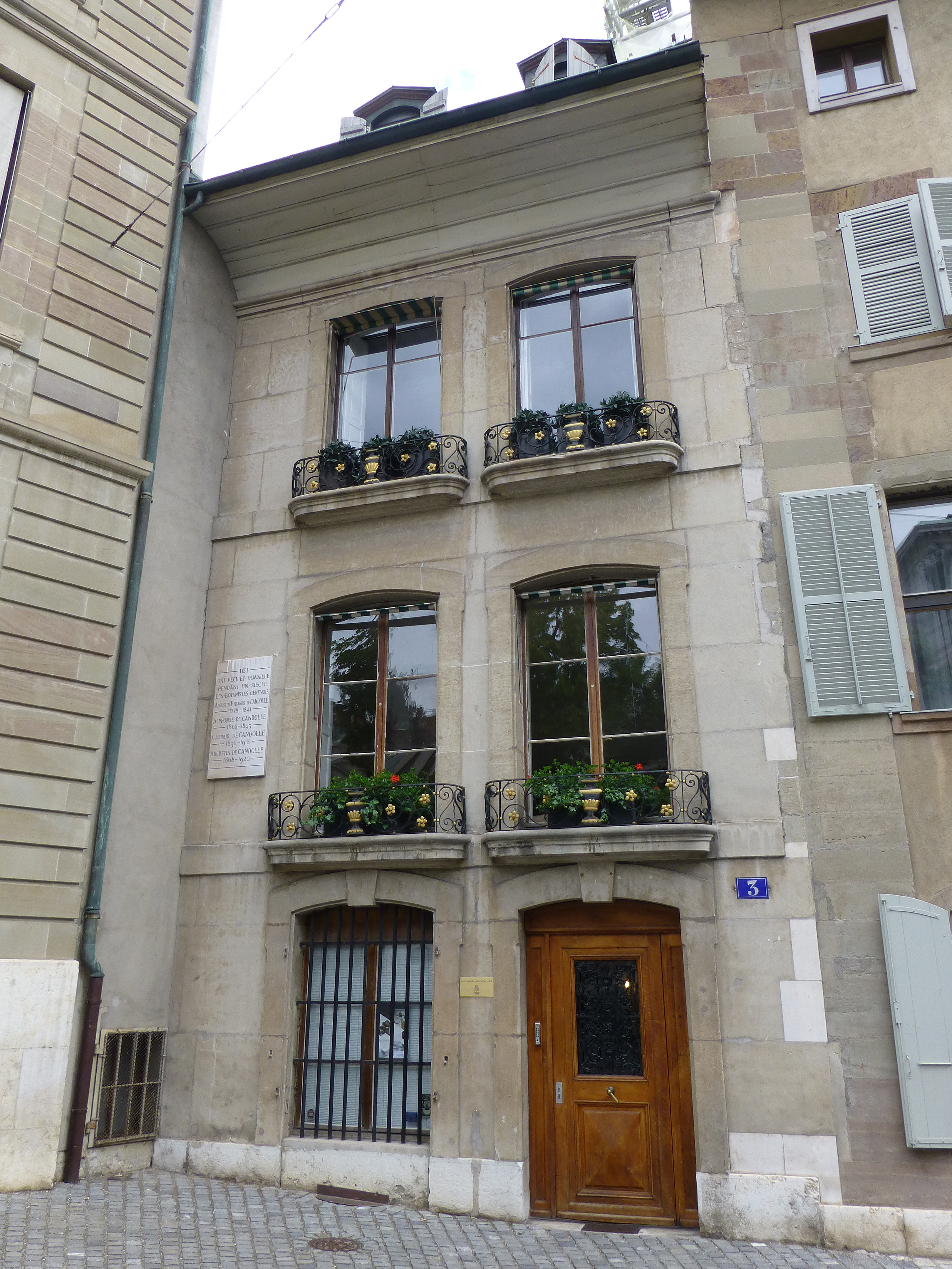 Genève (Suisse), maison au 3, Cour Saint-Pierre, avec plaque : "Ici ont vécu et travaillé pendant un siècle les botanistes genevois : Augustin Pyramidus de Candolle (1778-1841) Alphonse de Candolle (1806-1893) Casimir de Candolle (1836-1918) Augustin de Candolle (1868-1920)"